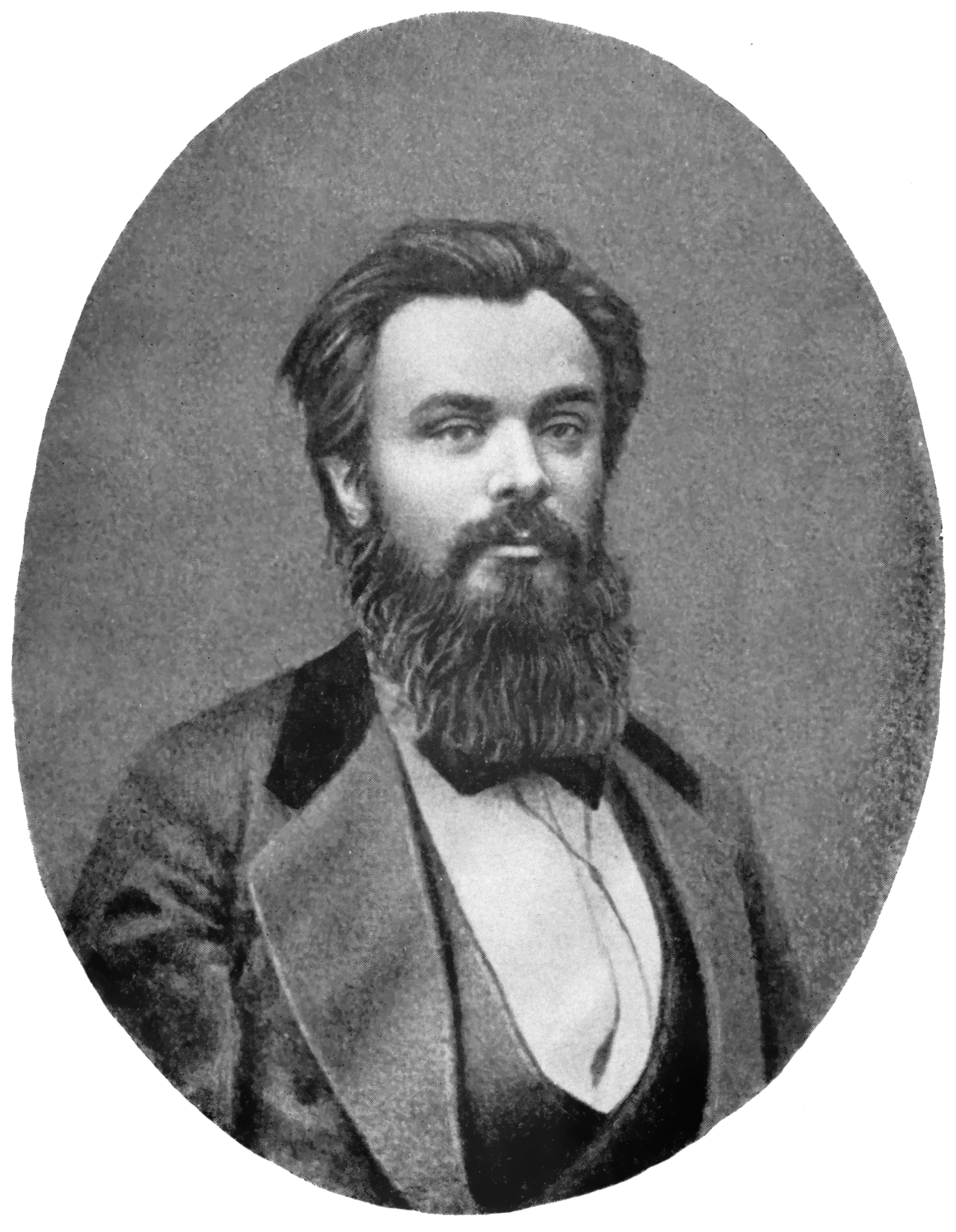 Российский писатель и драматург М.П. Старицкий (1840-1904)